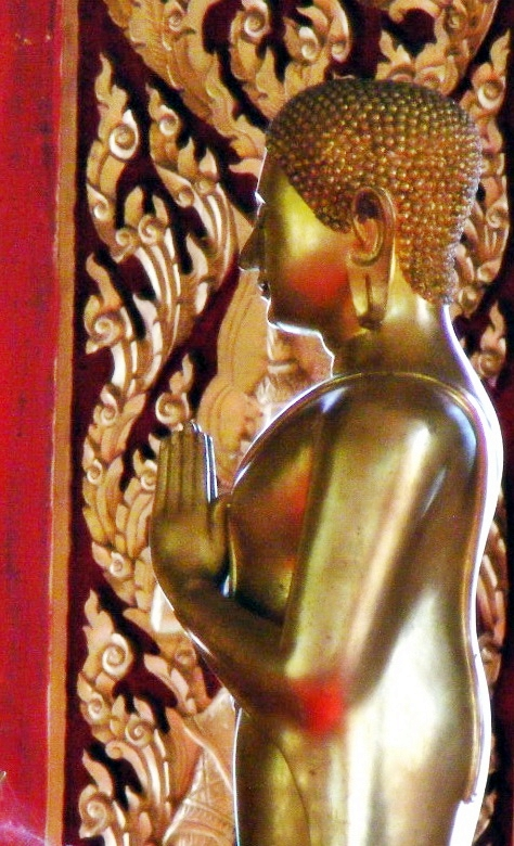 รูปหล่อพระมหาโมคคัลลานเถระ พระอัครสาวกเบื้องซ้าย ภายในอุโบสถวัดใหม่เจริญธรรม (อุตรดิตถ์) บ้านคุ้งตะเภา ตำบลคุ้งตะเภา อำเภอเมืองอุตรดิตถ์ จังหวัดอุตรดิตถ์.